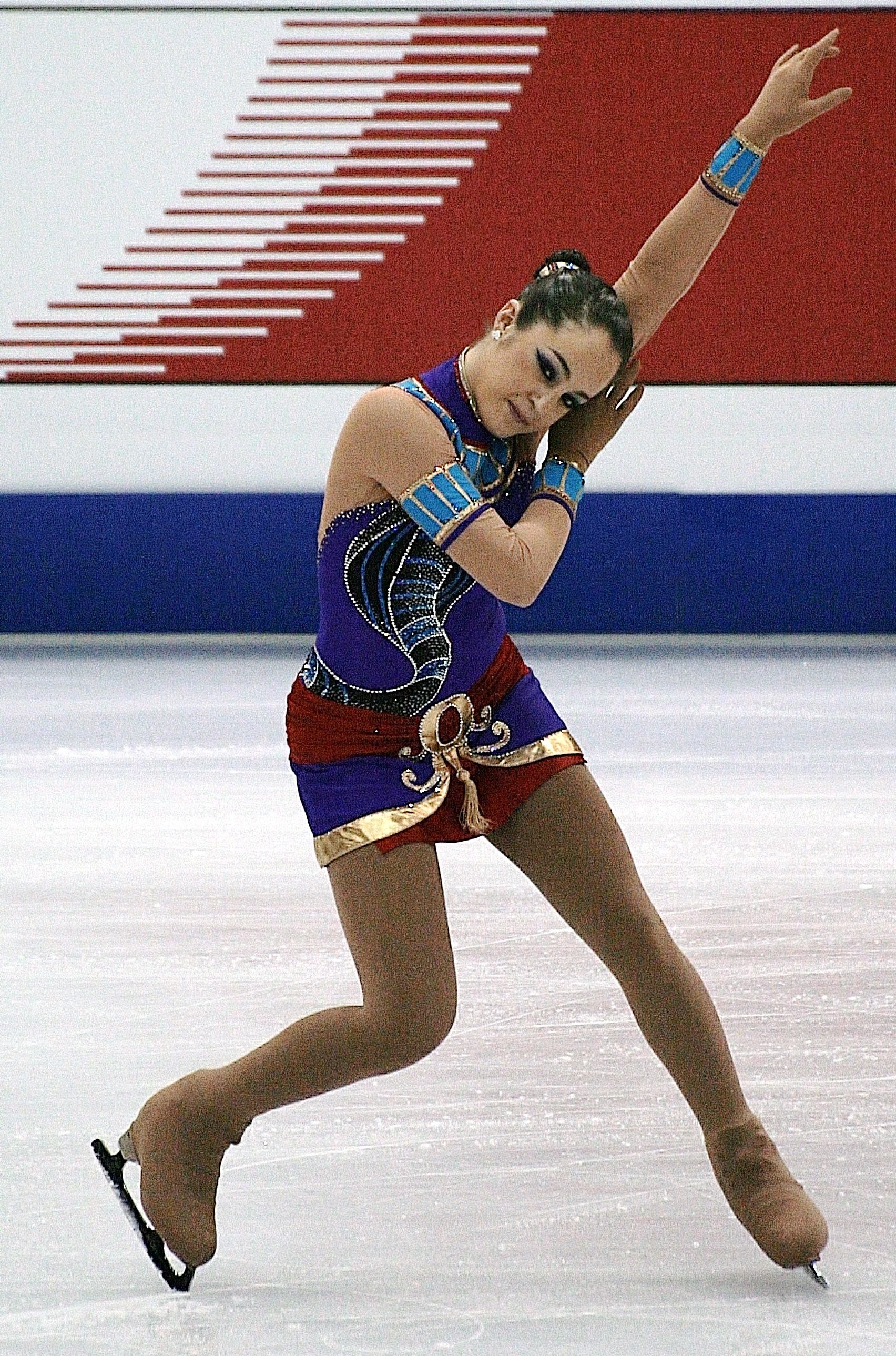 Рейна Амуй (Мексика) на чемпионате мира по фигурному катанию 2012.